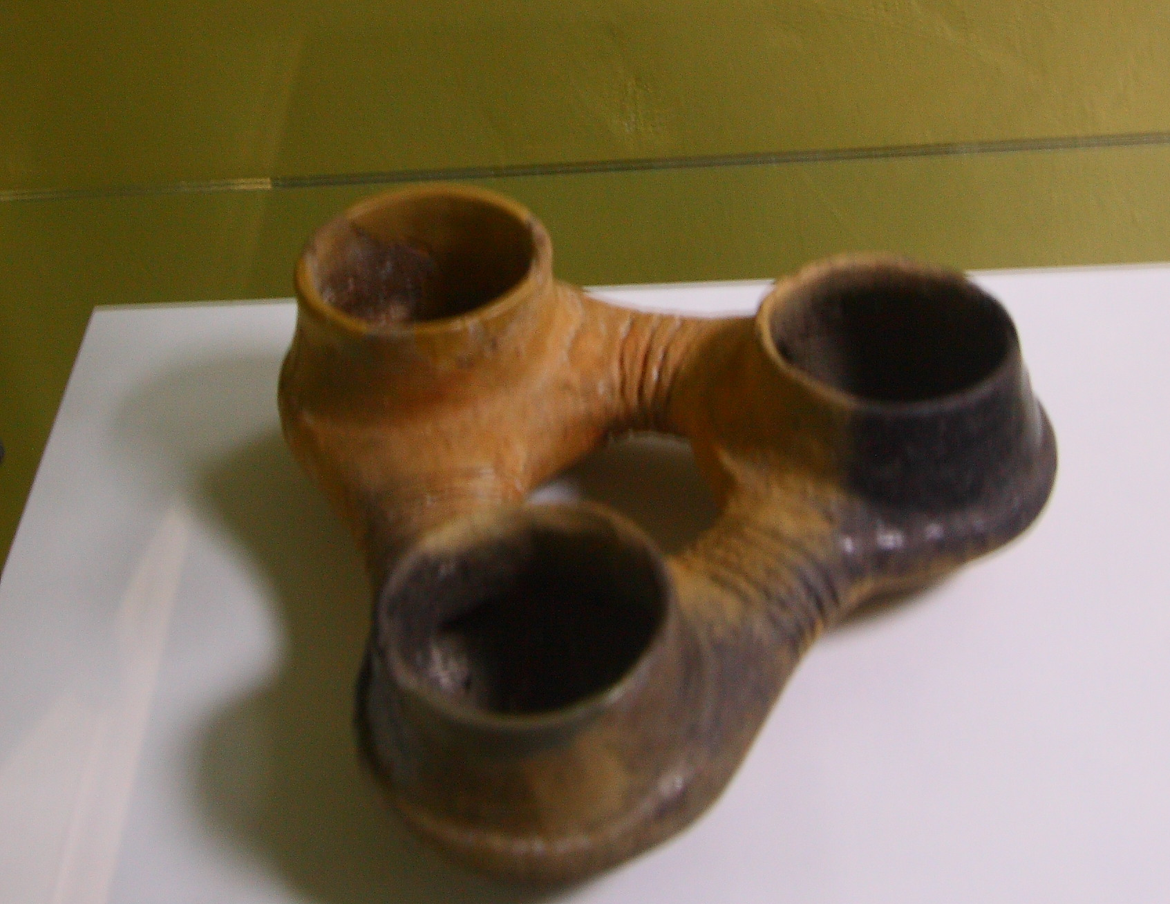 Gumelnita Muzeul Piatra Neamt